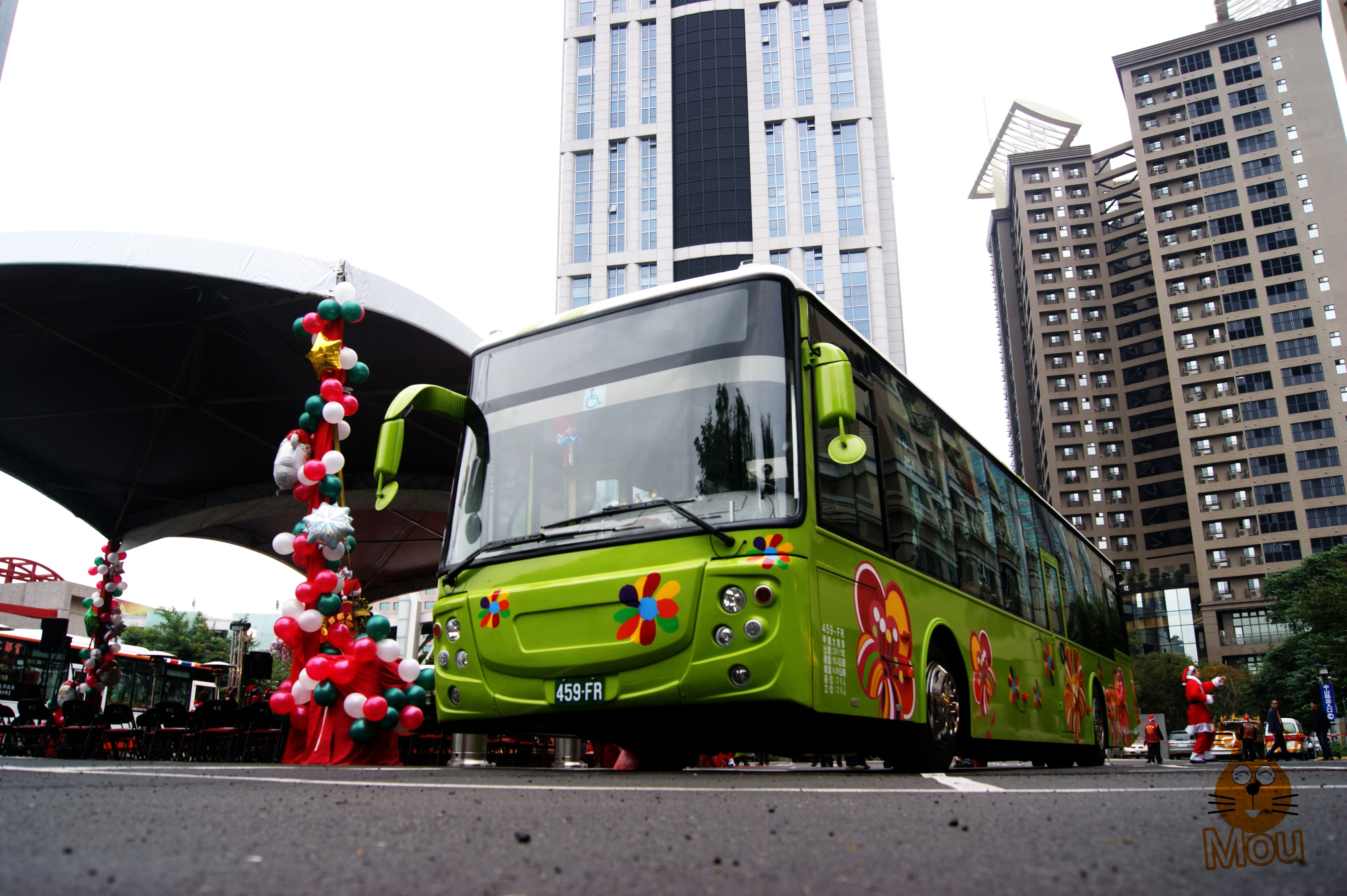 新北市區環狀線先導公車